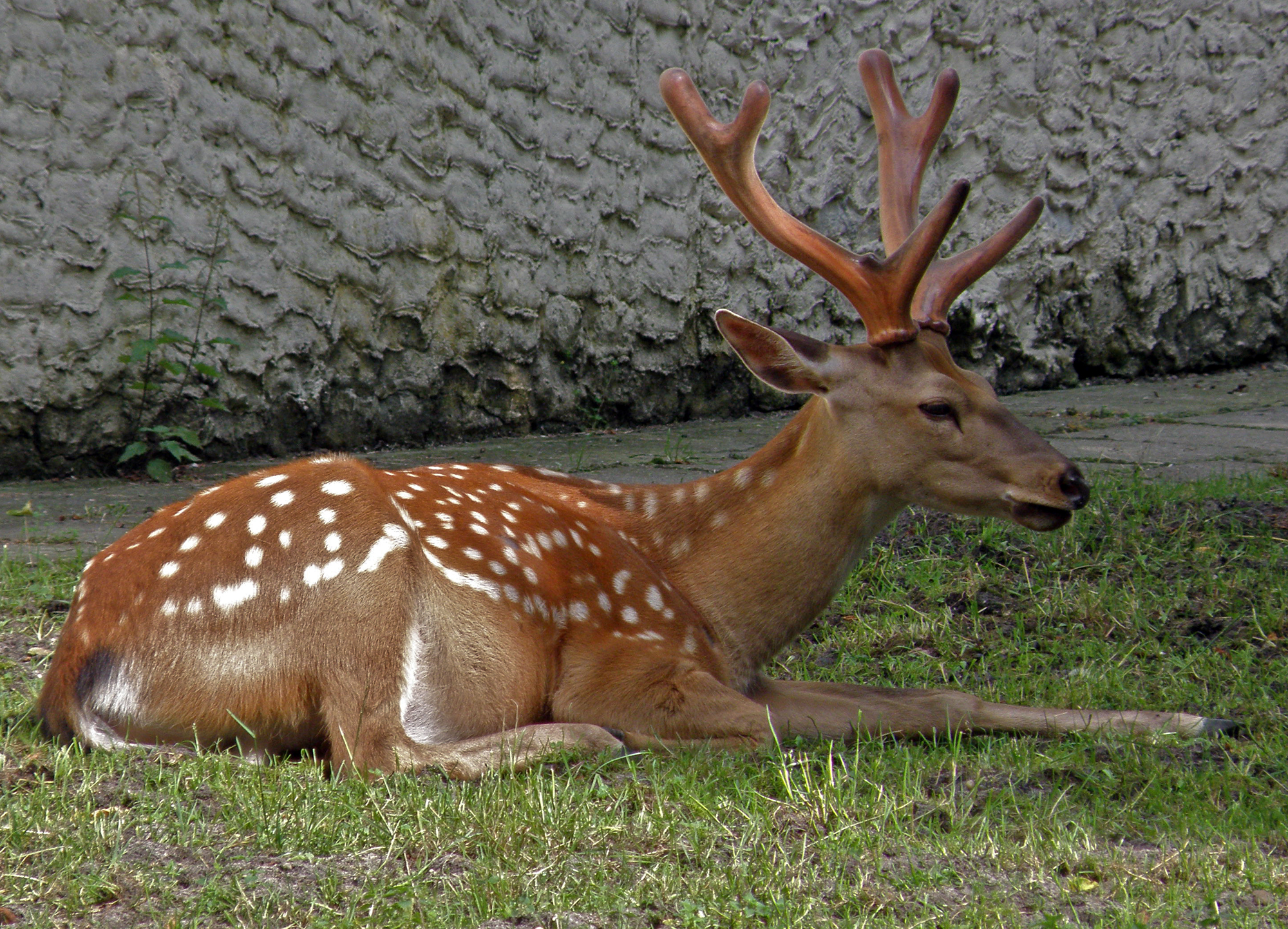 Warszawski Ogród Zoologiczny - Jeleń Mandżurski, Cervus nippon mantchuricus, Manchurian Sika